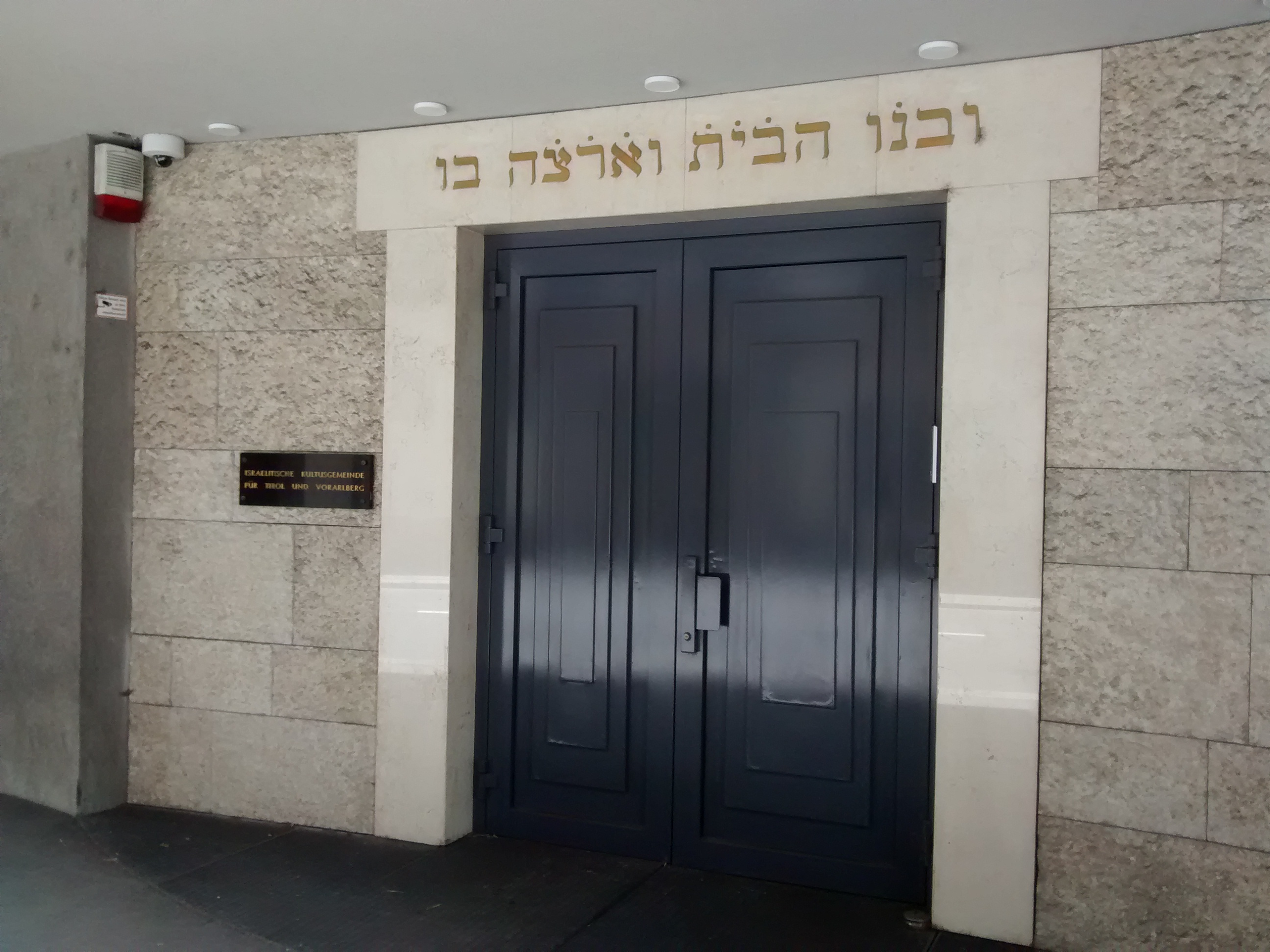 Israelitische Kultusgemeinde für Tirol und Vorarlberg, Innsbruck.